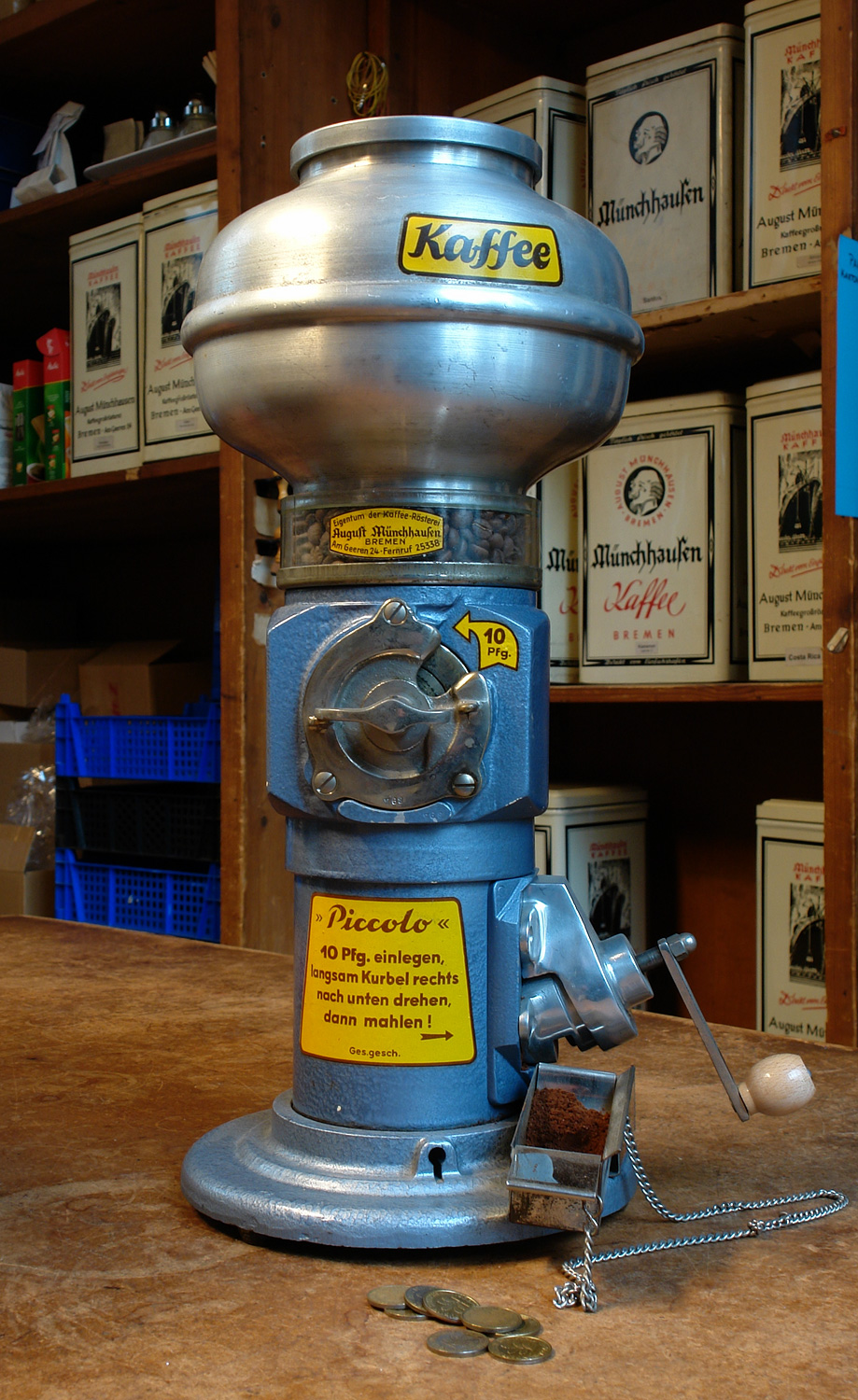 Kaffeerösterei Münchhausen in Bremen: Kaffeeautomat Piccolo (50er Jahre)